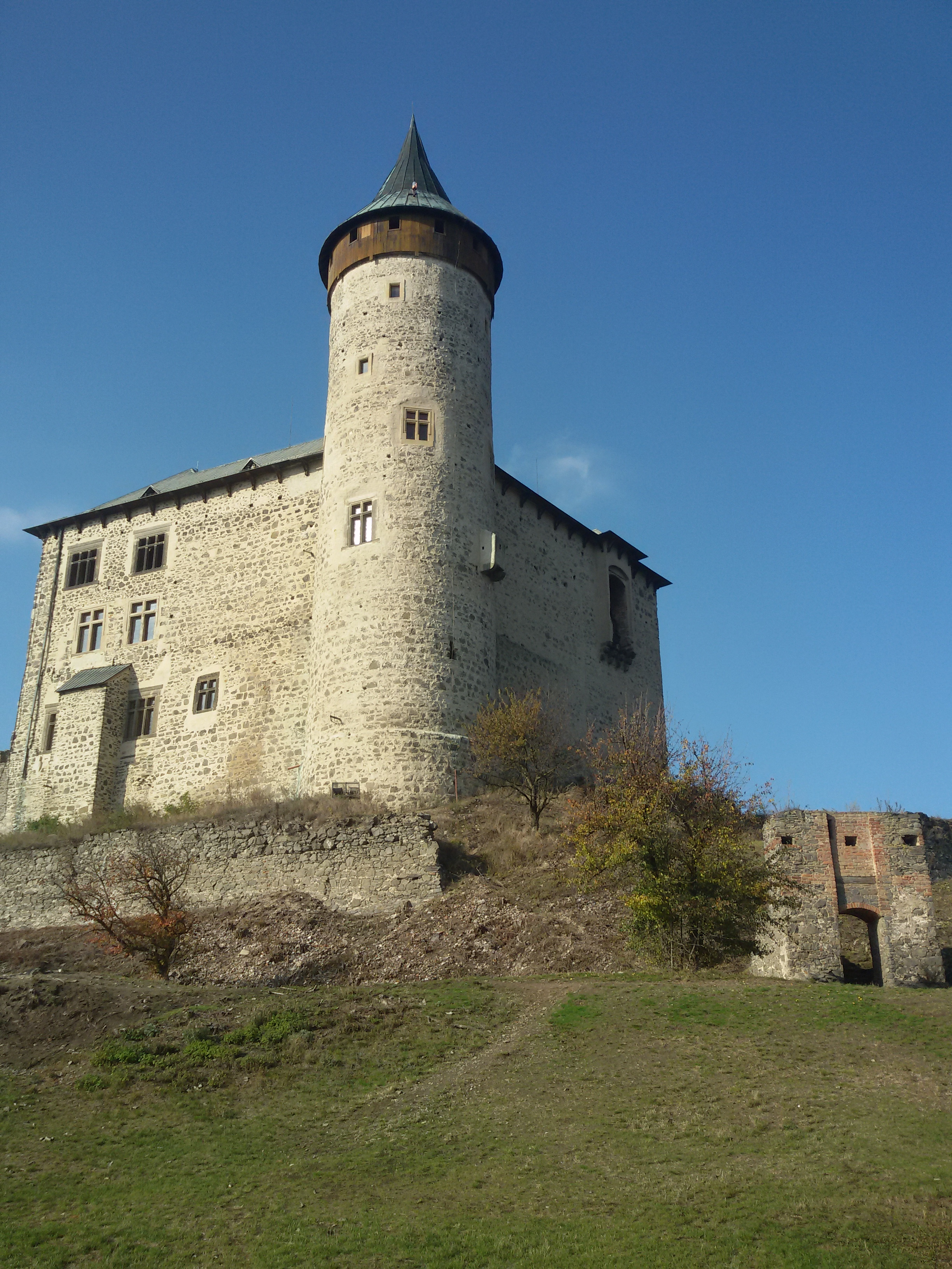 Kunětická hora u Pardubic.